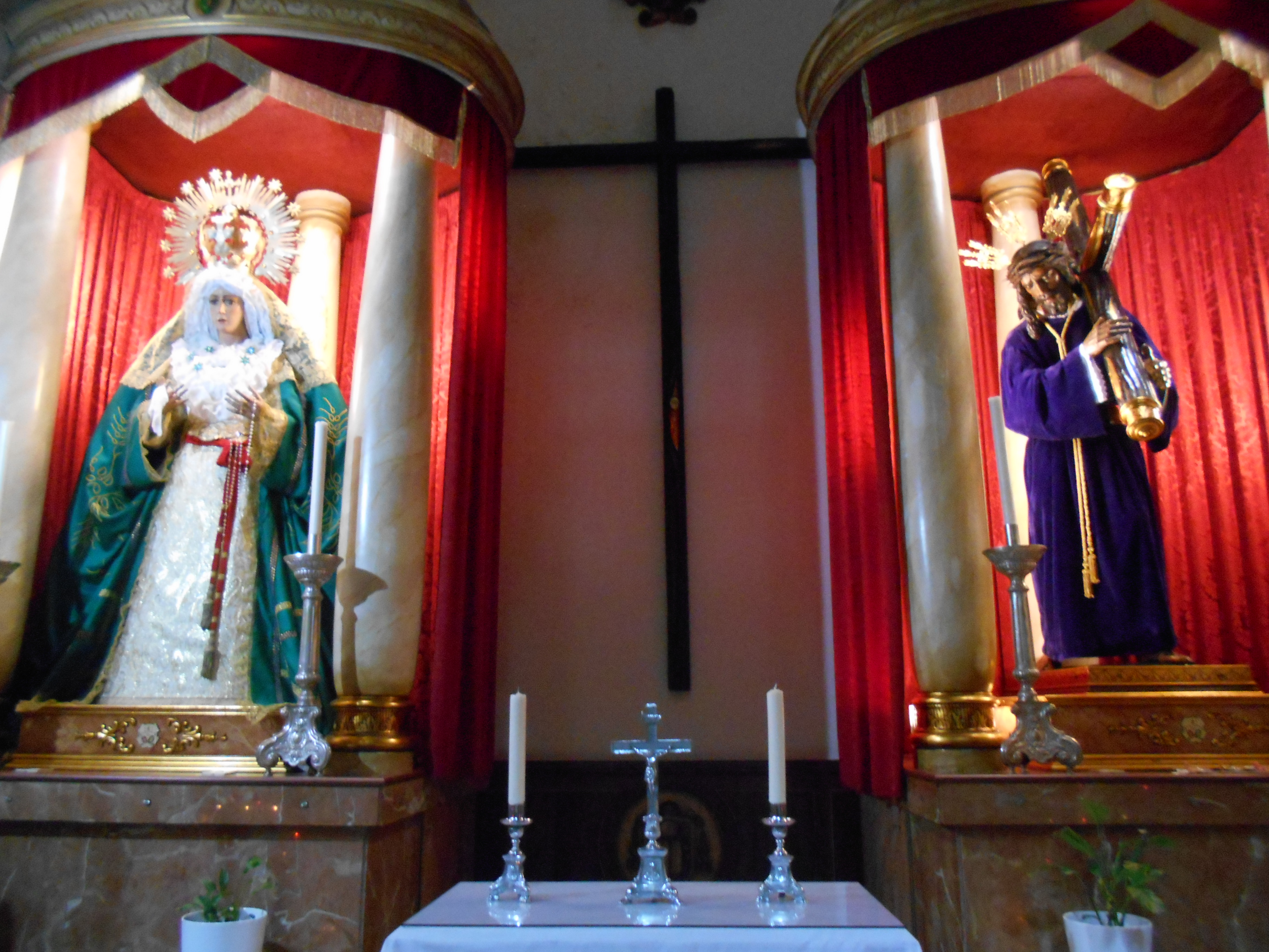 Capilla de la Hermandad del Gran Poder y de la Esperanza Macarena, iglesia de San Agustín, Barcelona.